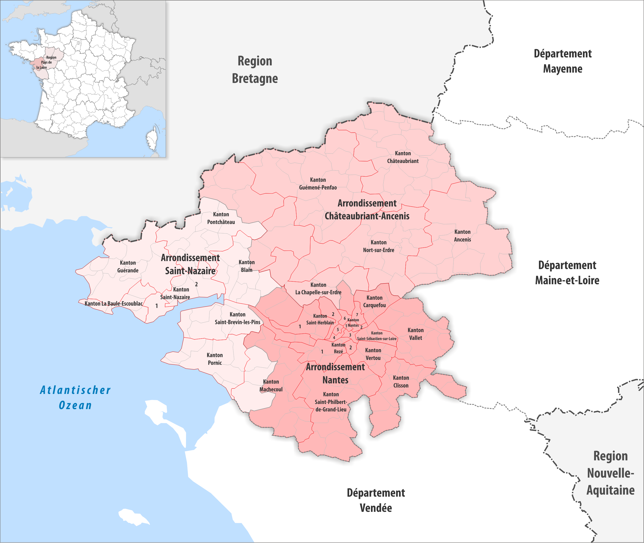 Gemeinden, Kantone und Arrondissemente im Departement Loire-Atlantique